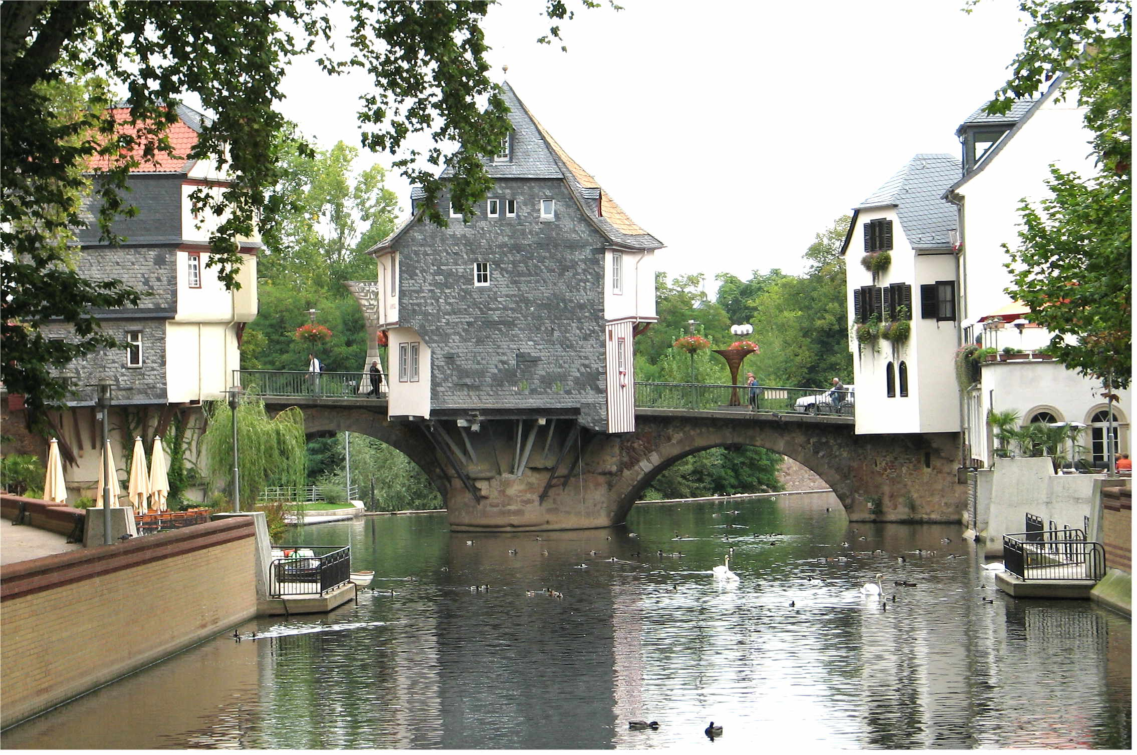 Brëckenhäiser zu Bad Kreuznach.